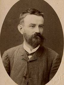 Karel Bubela